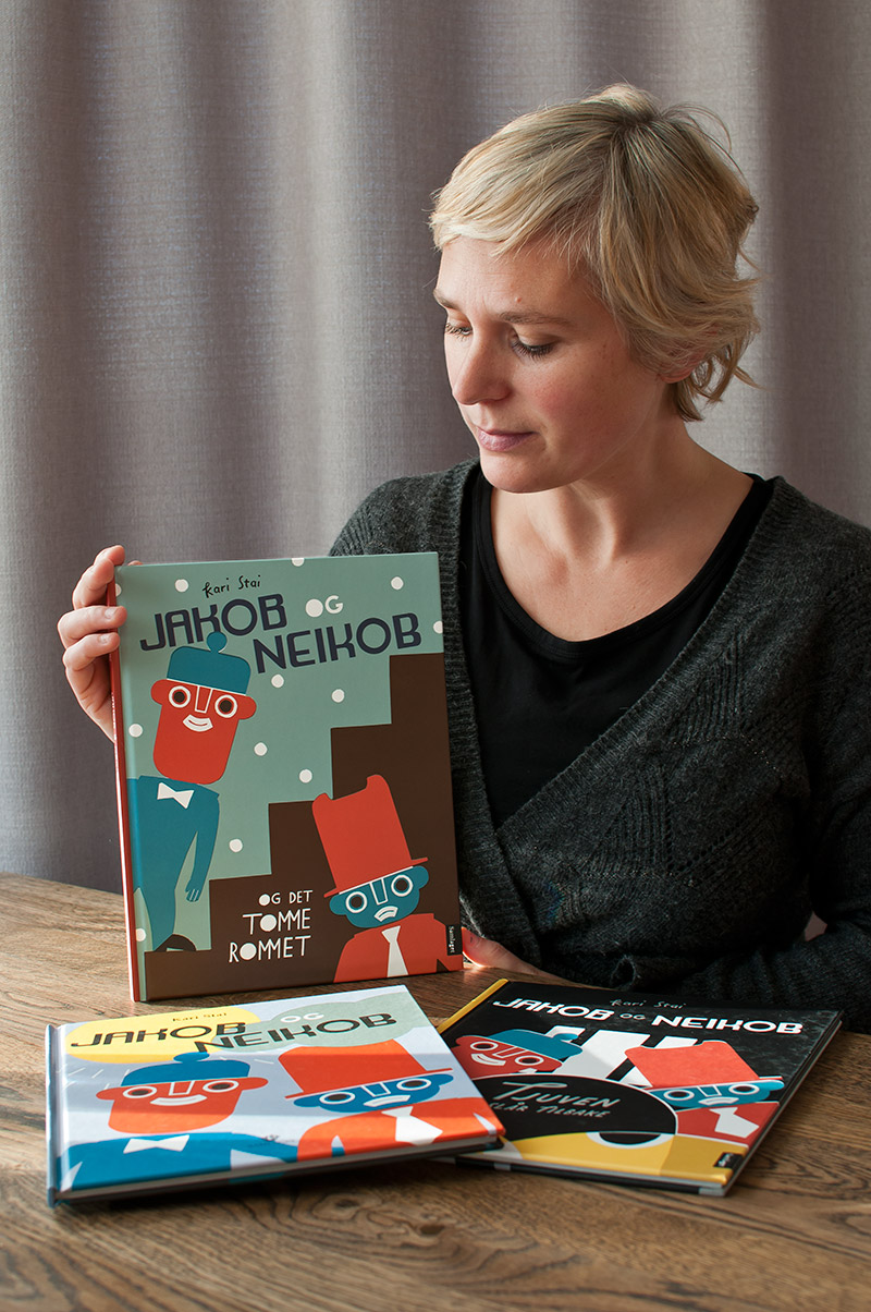 Forfatter og illustratør Kari Stai fra Inderøy, Nord-Trøndelag